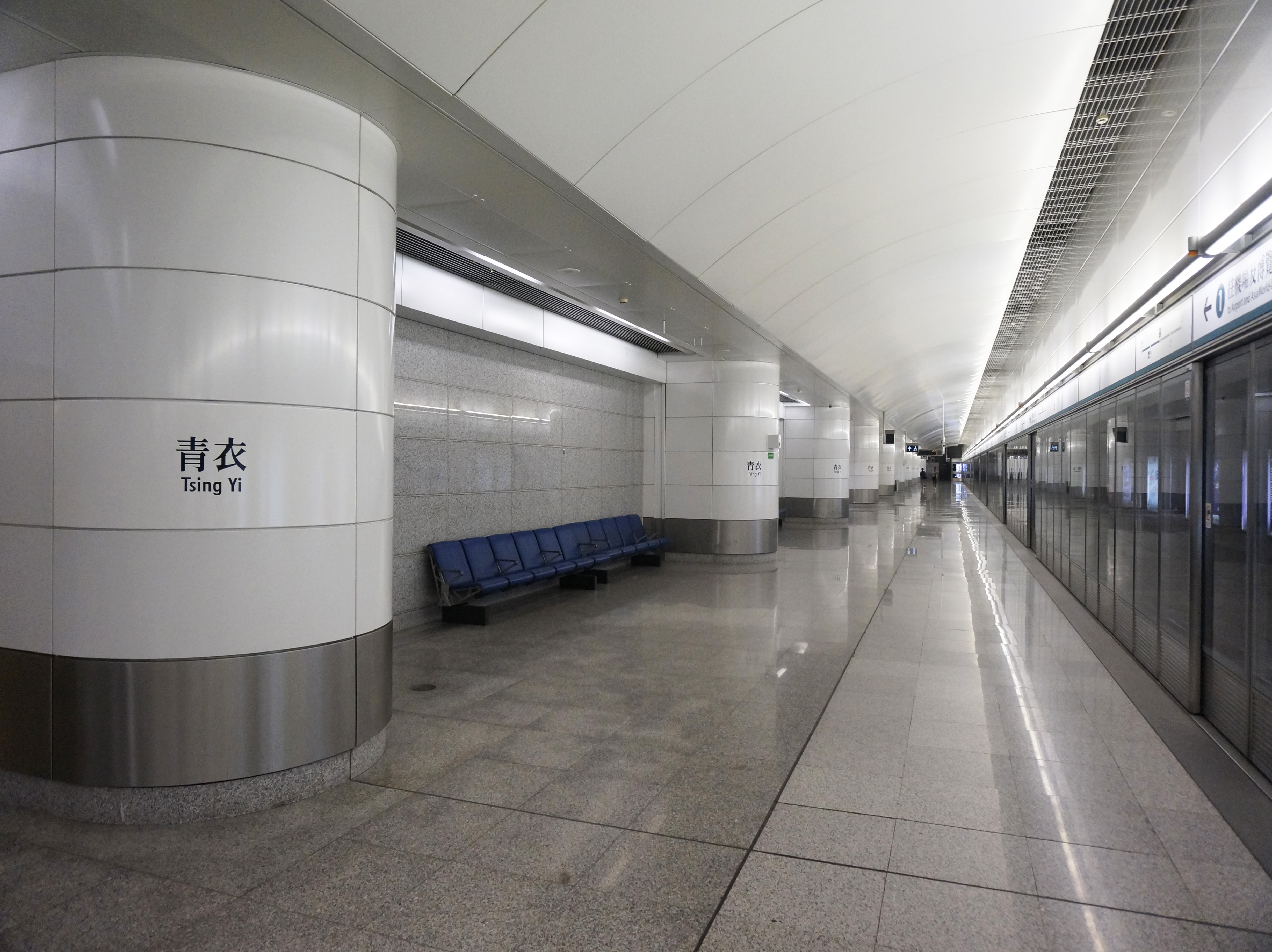 港鐵青衣站機場快線月台